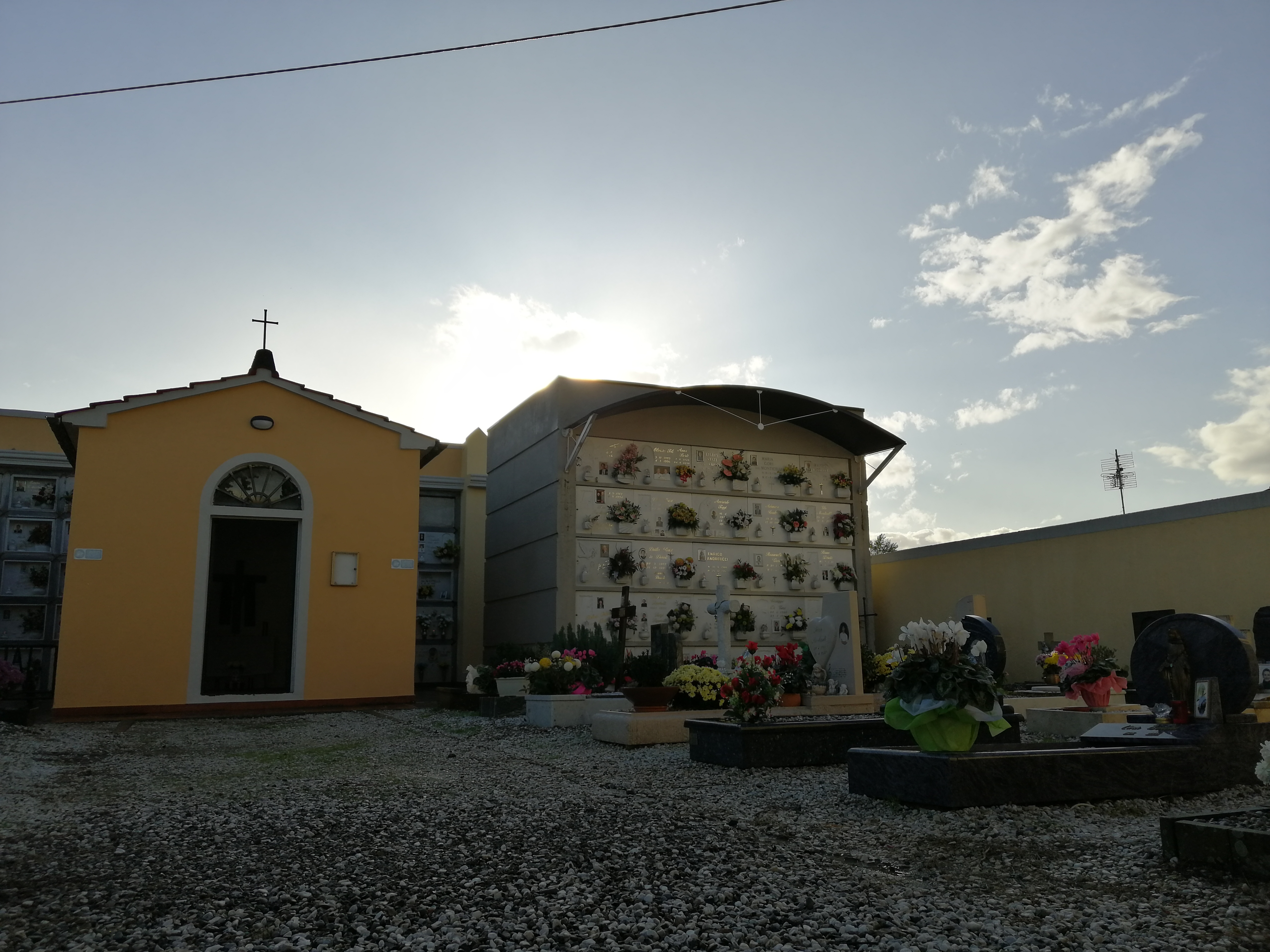 cappella del cimitero_restaurata 2019